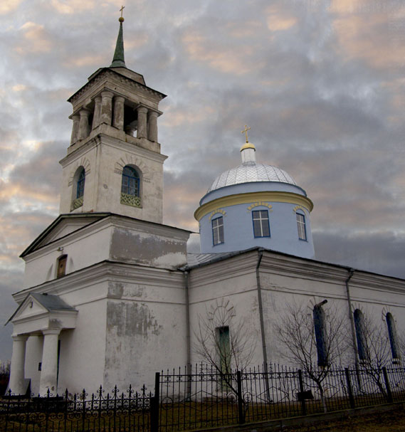 Церква святих Бориса і Гліба у Переяслав-Хмельницькому